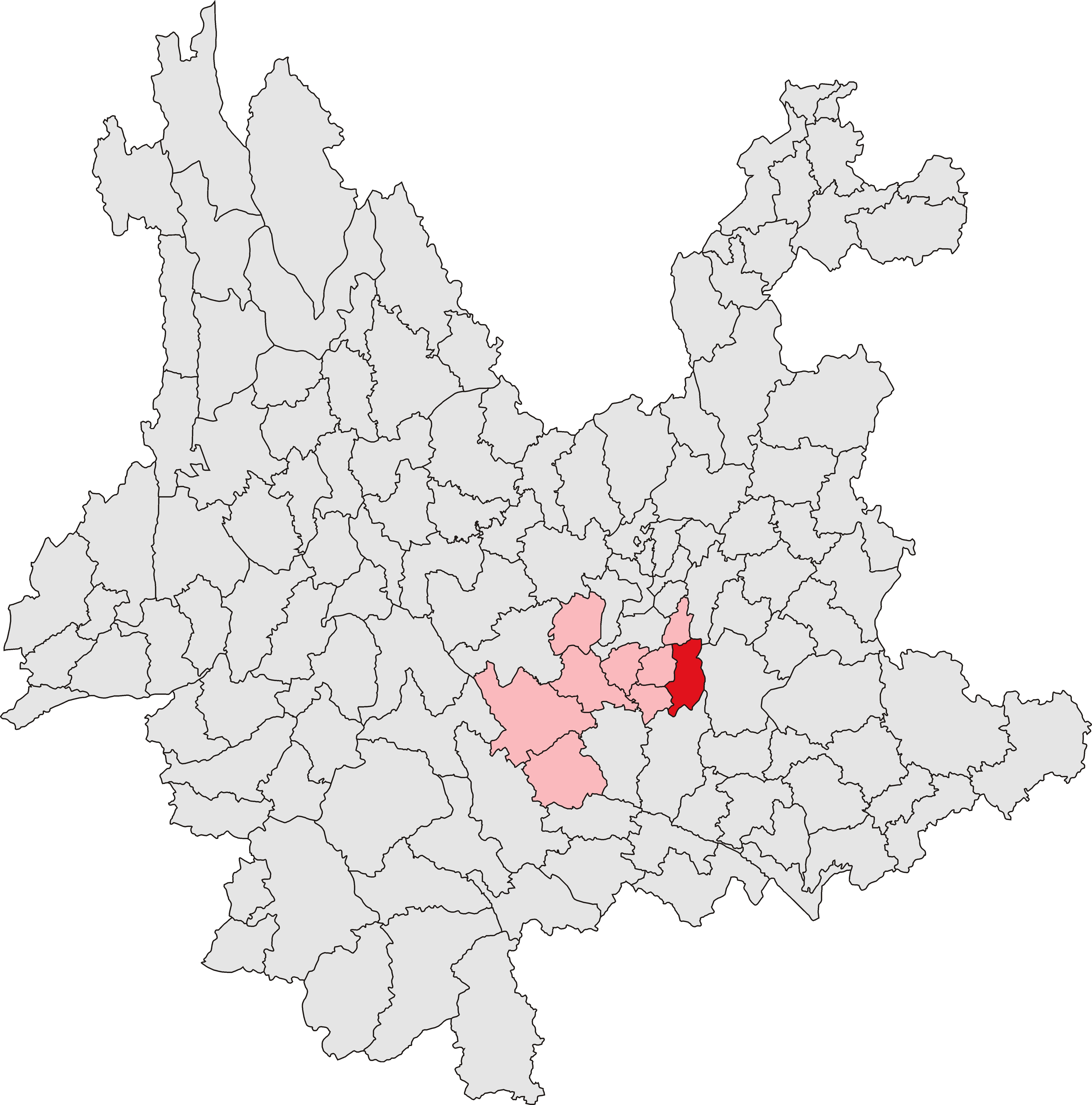 华宁县位置图